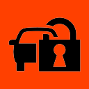 Témoin de l'antidémarrage